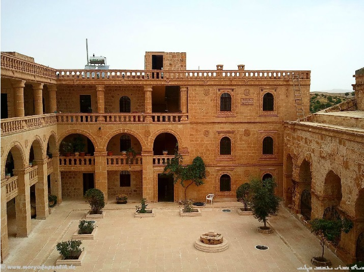 Der Klosterhof mit dem gegenüberliegenden Gästehaus